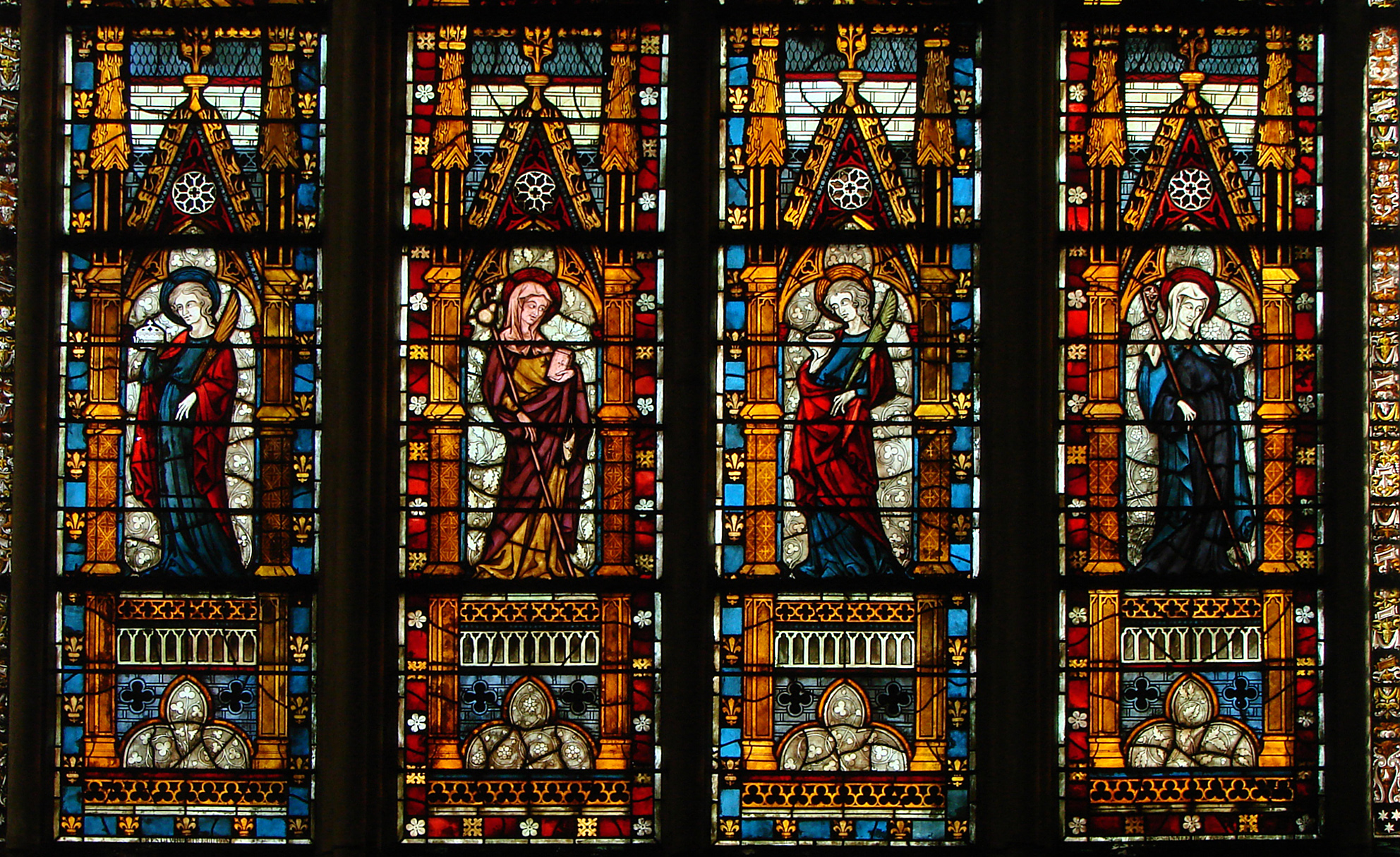 Vitrail de la cathédrale Saint-Pierre-et-Saint-Paul de Troyes, bas-côté Sud, 13ème siècle. Partie nettoyée.